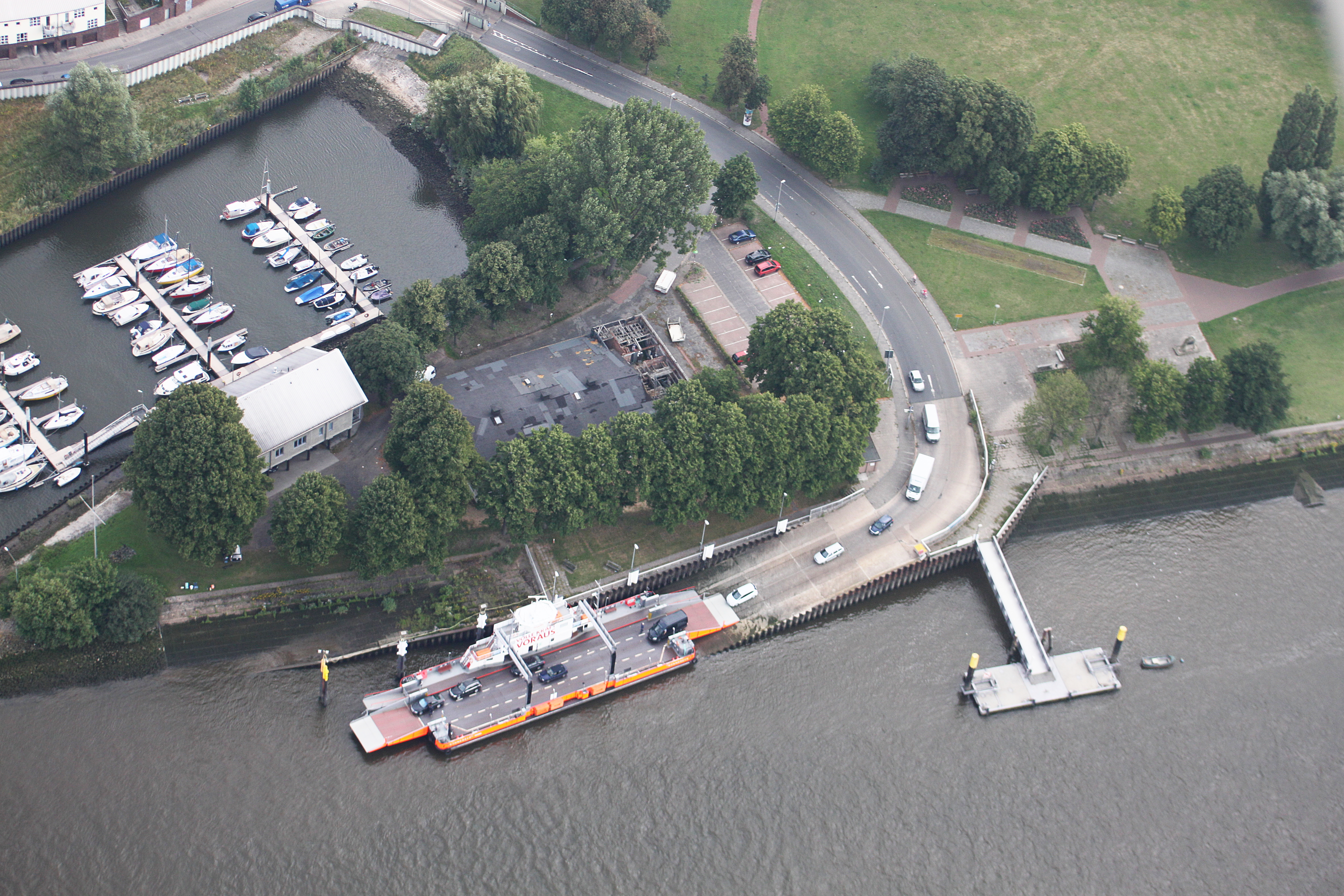 Fähre Blumenthal; Bremen Nord; Hafen Wassersportverein Blumenthal e.V.; Fotoflug Bremen; Flughöhe 500 m; Luftbilder Bremen-Nord: vom U-Boot Bunker Valentin bis Vegesack ; Flug entlang der Weser von West nach Ost, über dem linken Weserufer, mit Blickrichtung zum rechten Weserufer ; Anleger Blumenthal der Fähre Blumenthal-Motzen